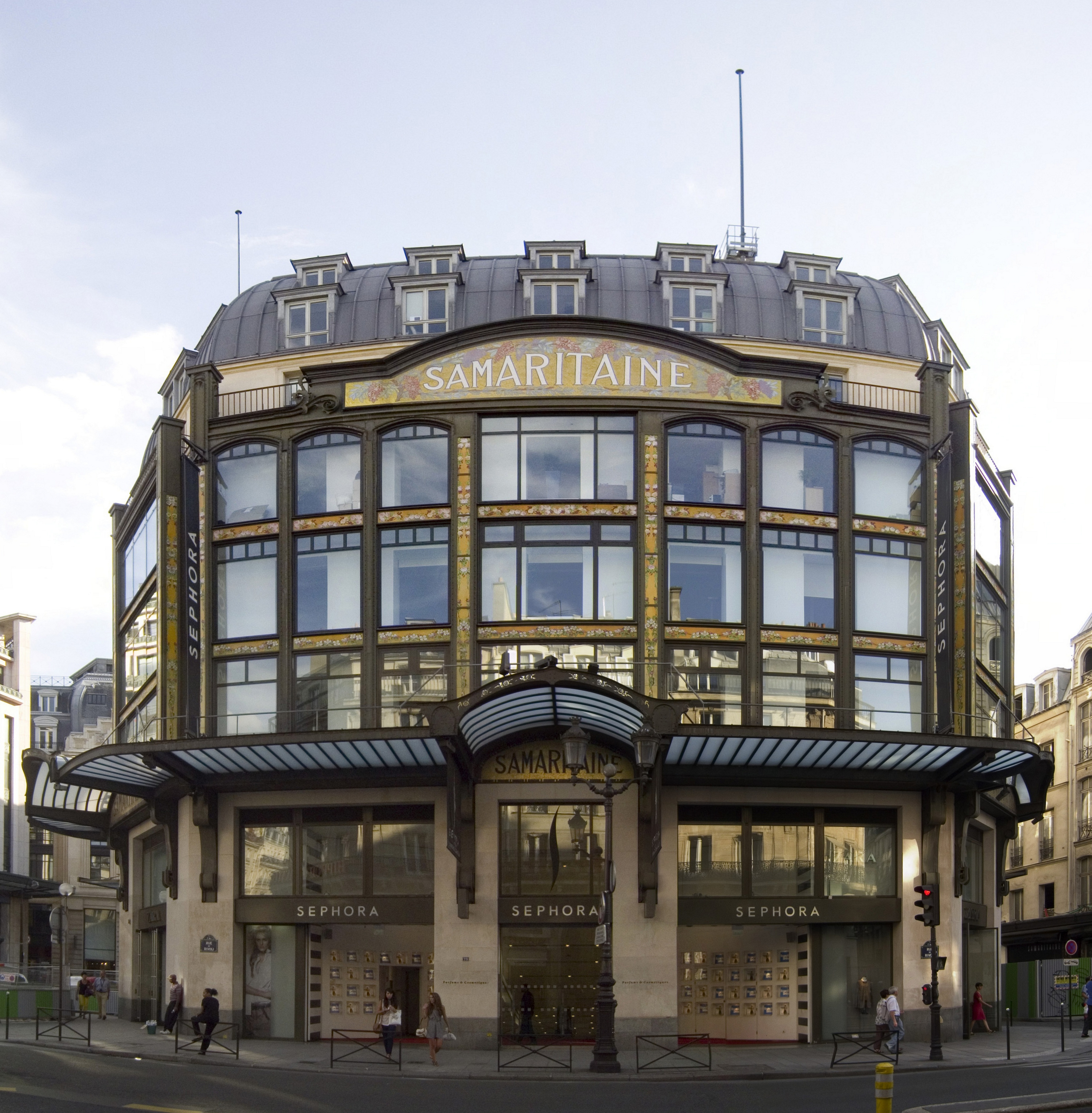 La Samaritaine